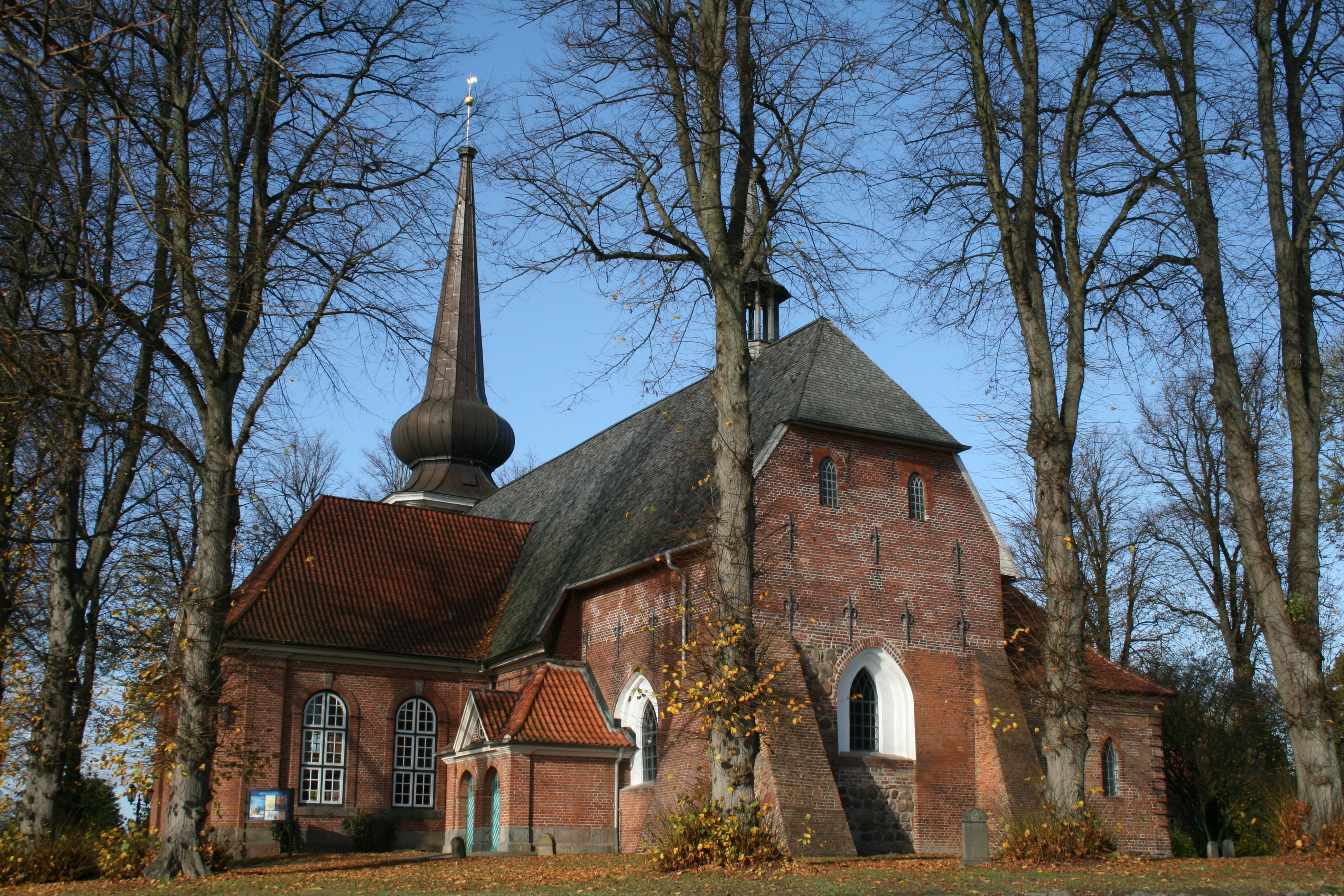 Katharinenkirchen Propsteierhagen von Osten (Blick auf die Chorwand) This is a photograph of an architectural monument. .1